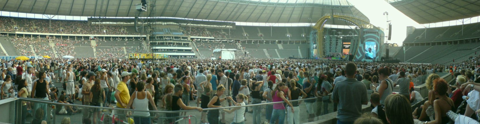 Robbie Williams in Berlin